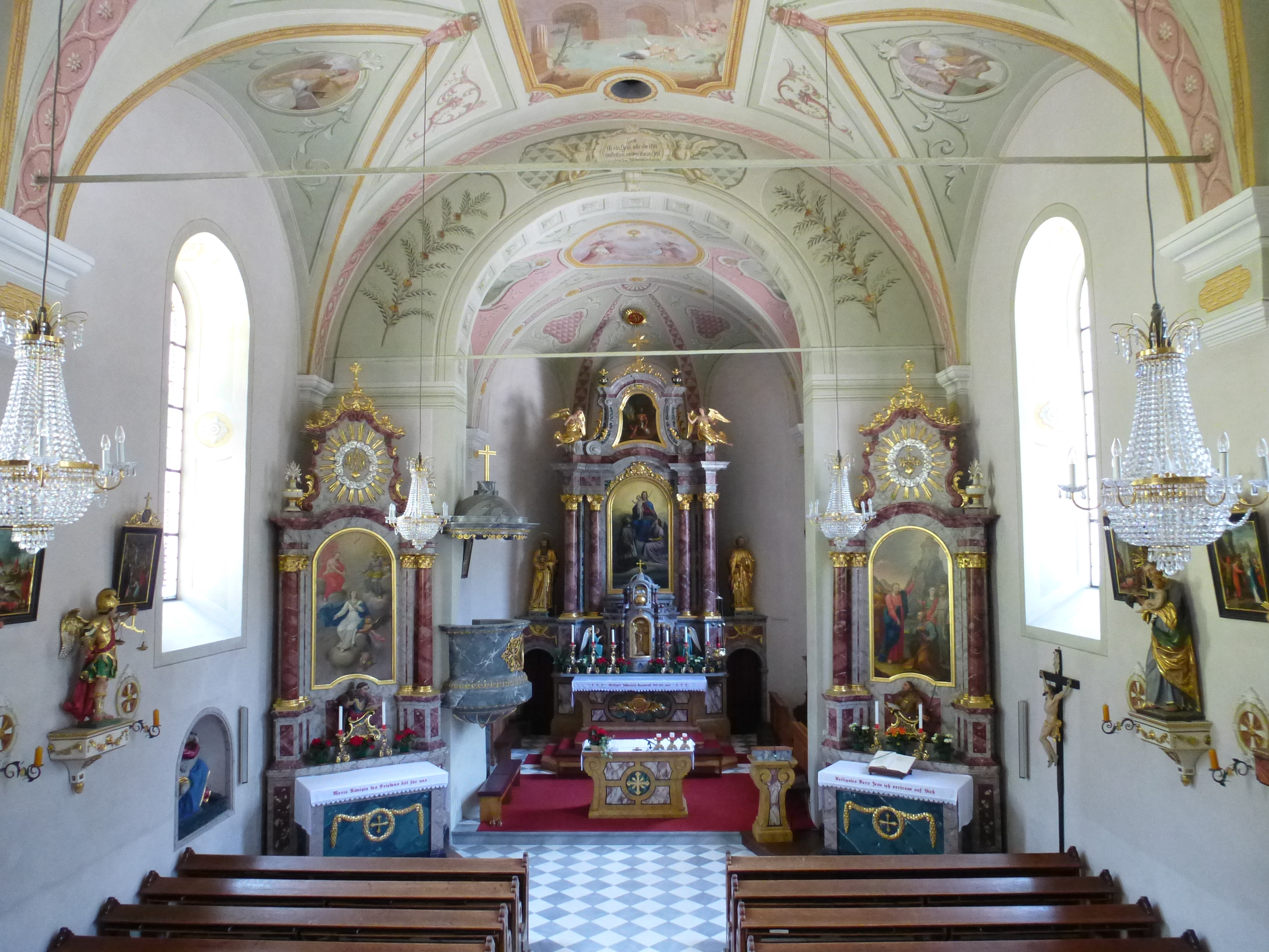 Kath. Pfarrkirche hl. Johannes von Nepomuk; Innenansicht